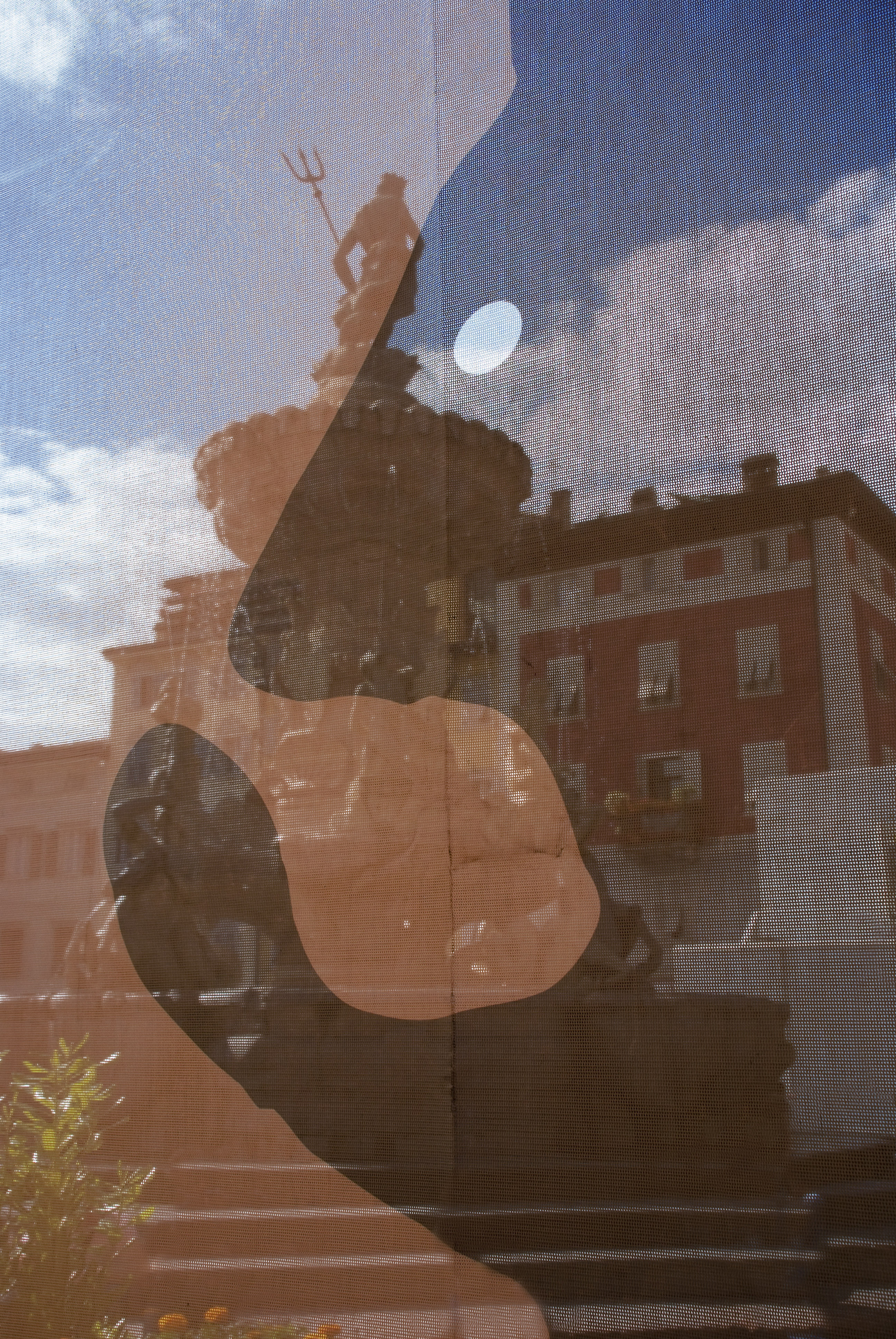 Vista della fontana del Nettuno attraverso la tenda di uno stand del festival dell'economia di Trento